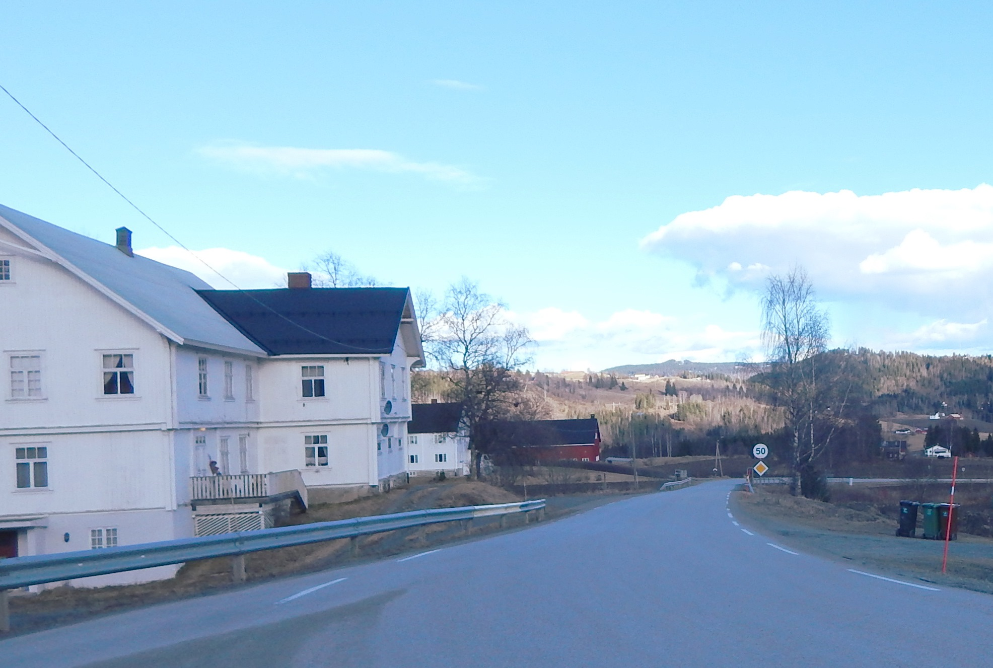 Rypsekkvegen (fylkesvei 2290, tidl. FV15) sett fra krysset med Lunnerlinna